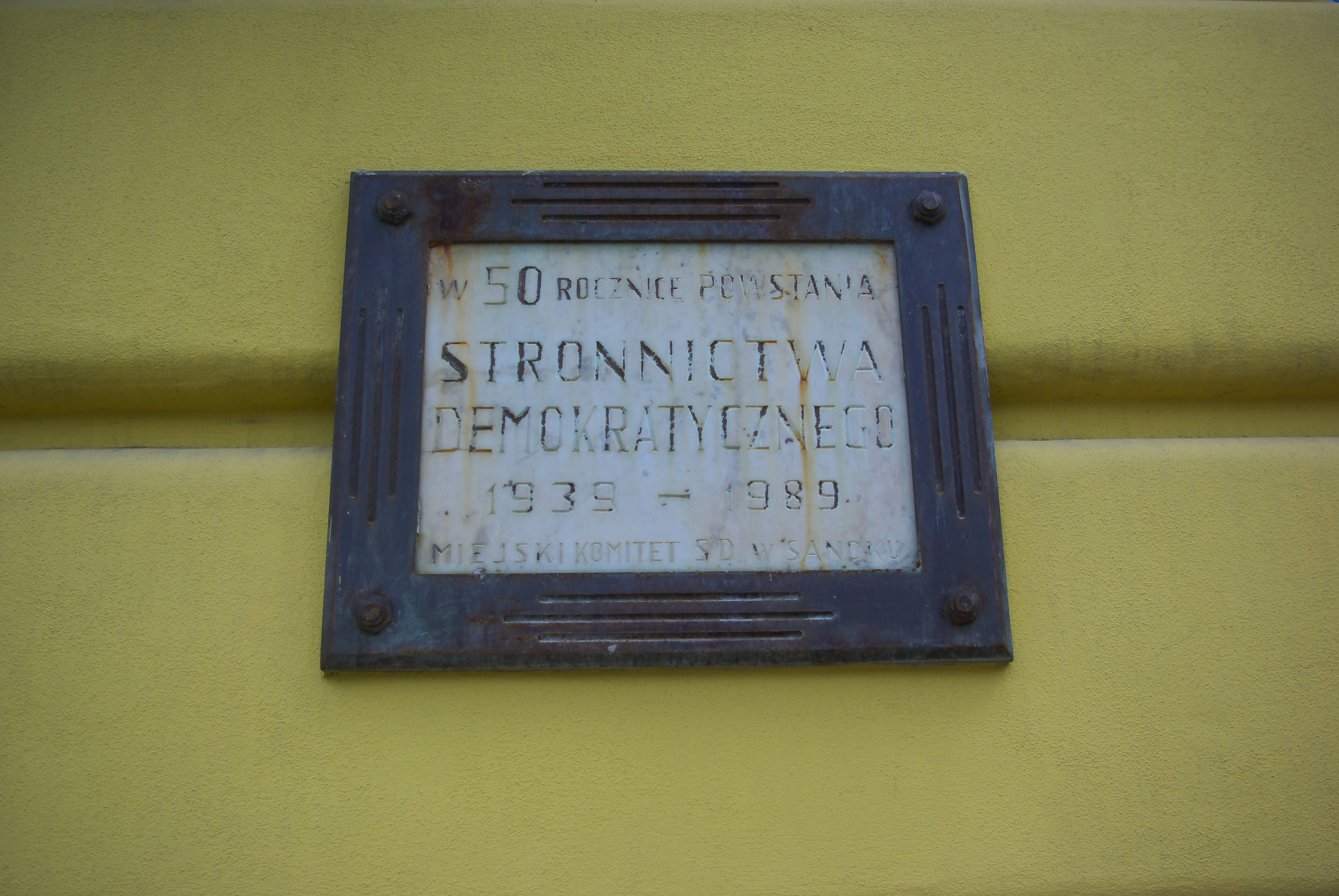 Tablica pamiątkowa ustanowiona dla uczczenia 50. rocznicy powstania Stronnictwa Demokratycznego na fasadzie budynku przy ulicy Kościuszki 22 w Sanoku